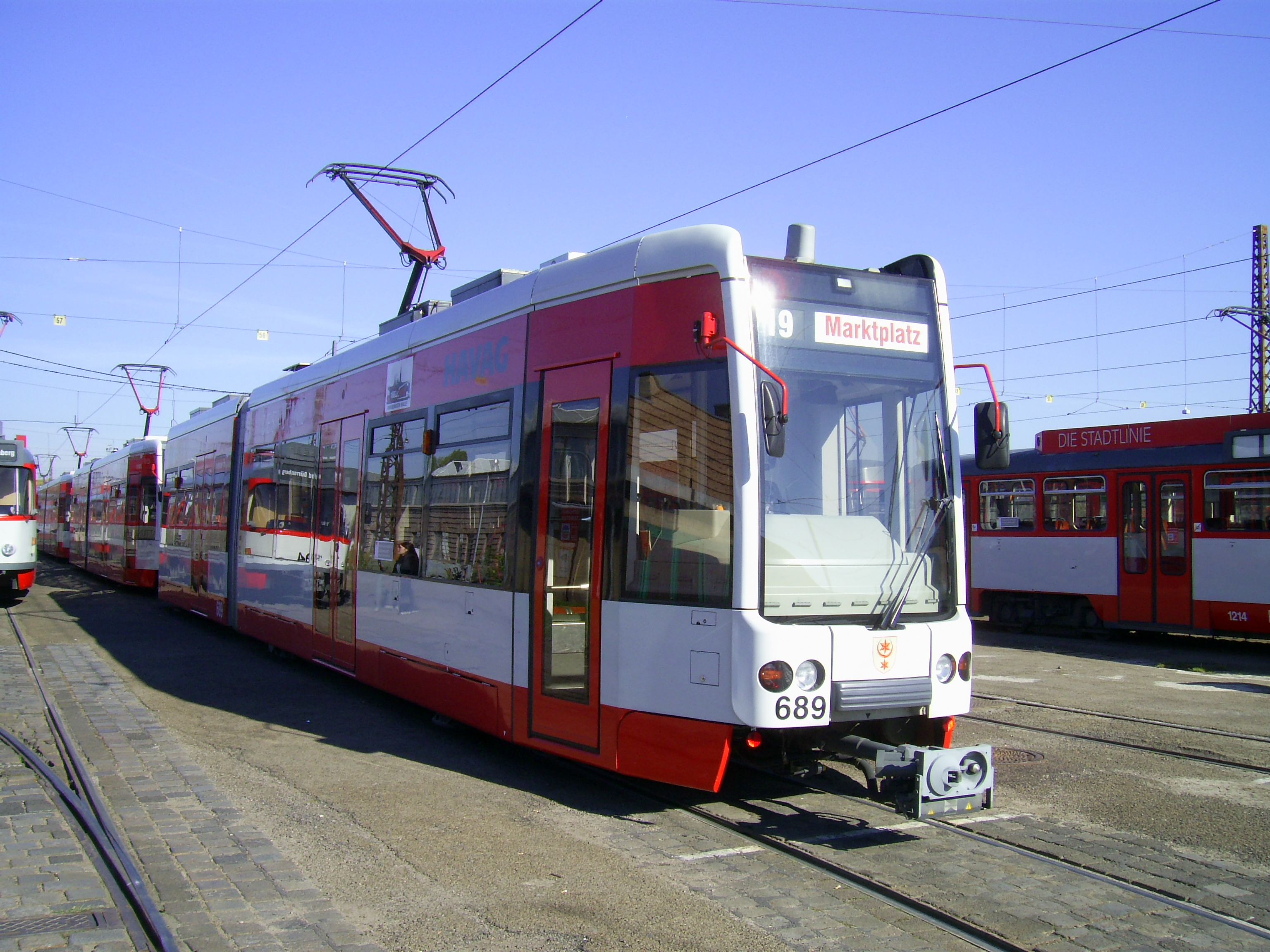 Strassenbahn Halle Tw 689